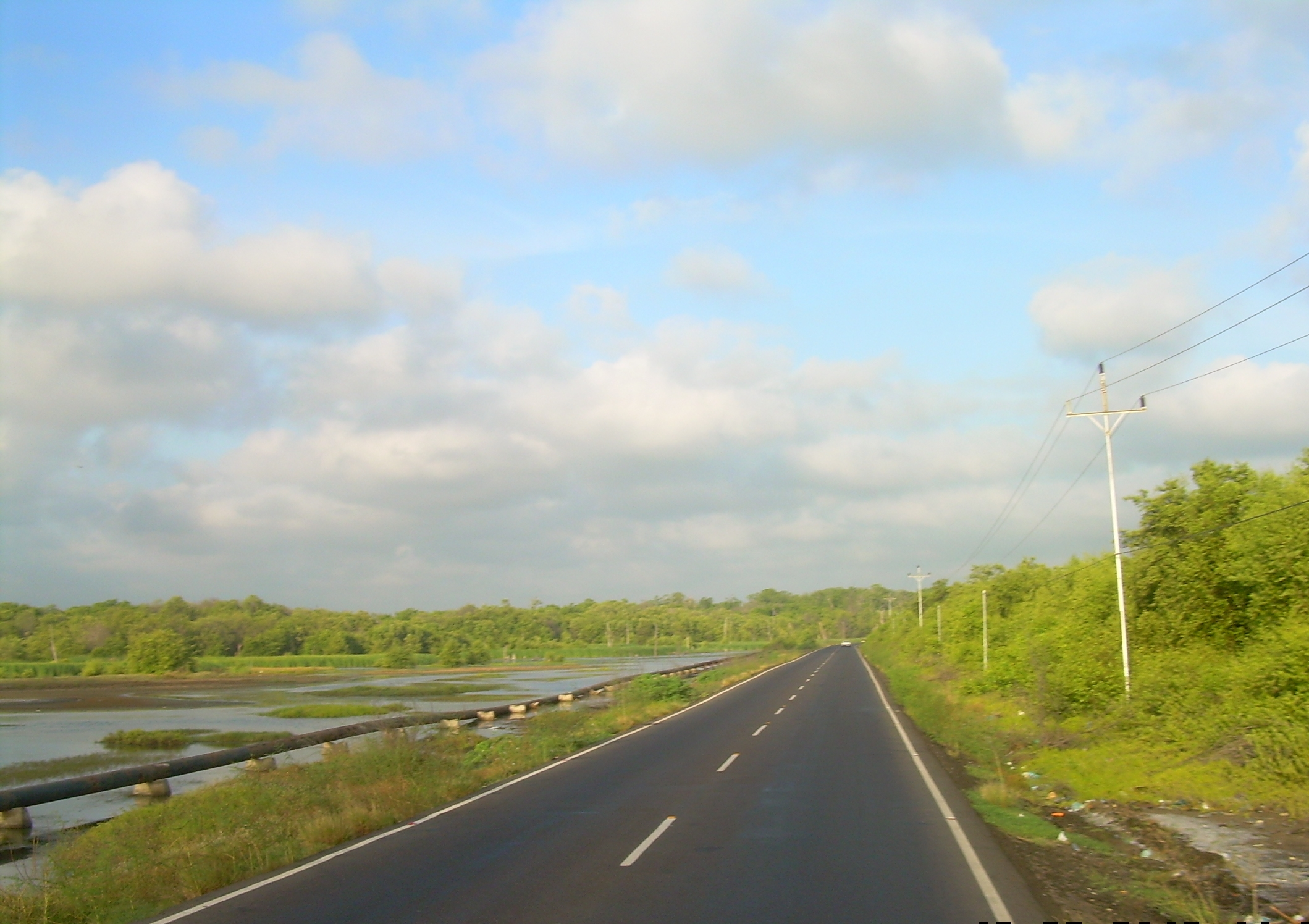 Carreteras